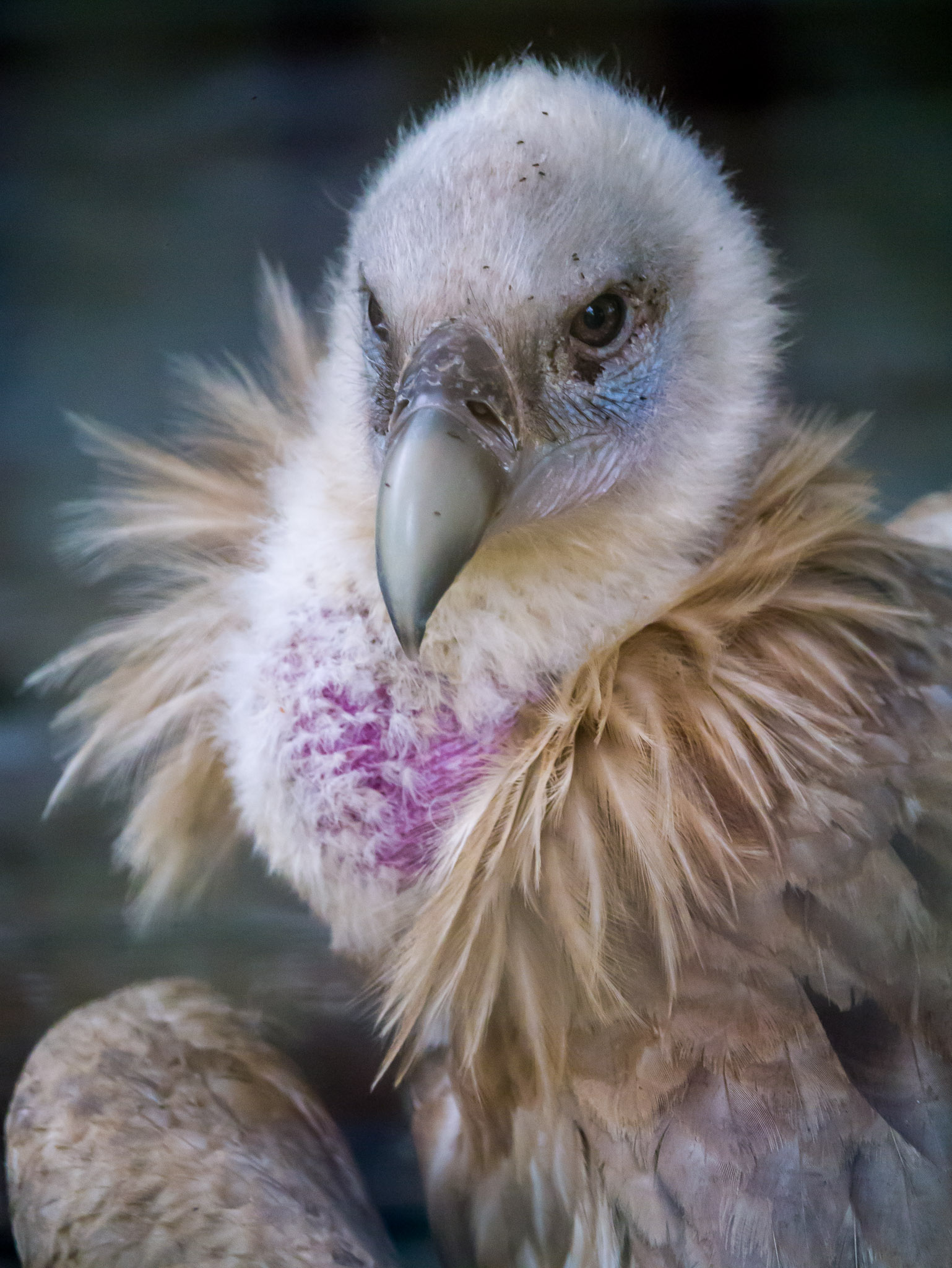 Himalayan Vulture